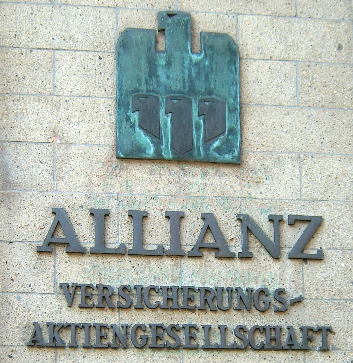 Hamburg, Altstadt, Trostbrücke, Globushof.